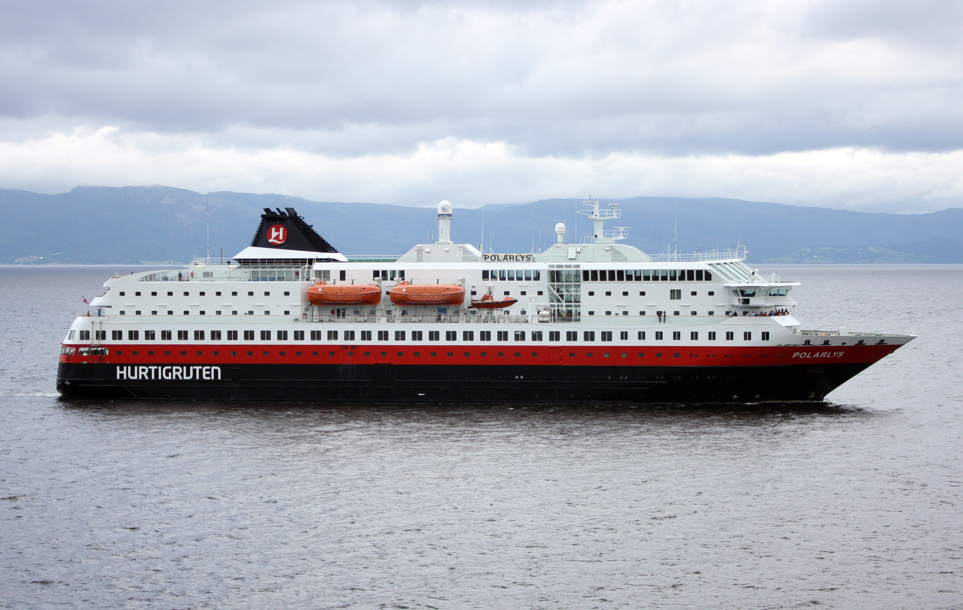 Hurtigruten Polarlys på vei inn til Trondheim havn.